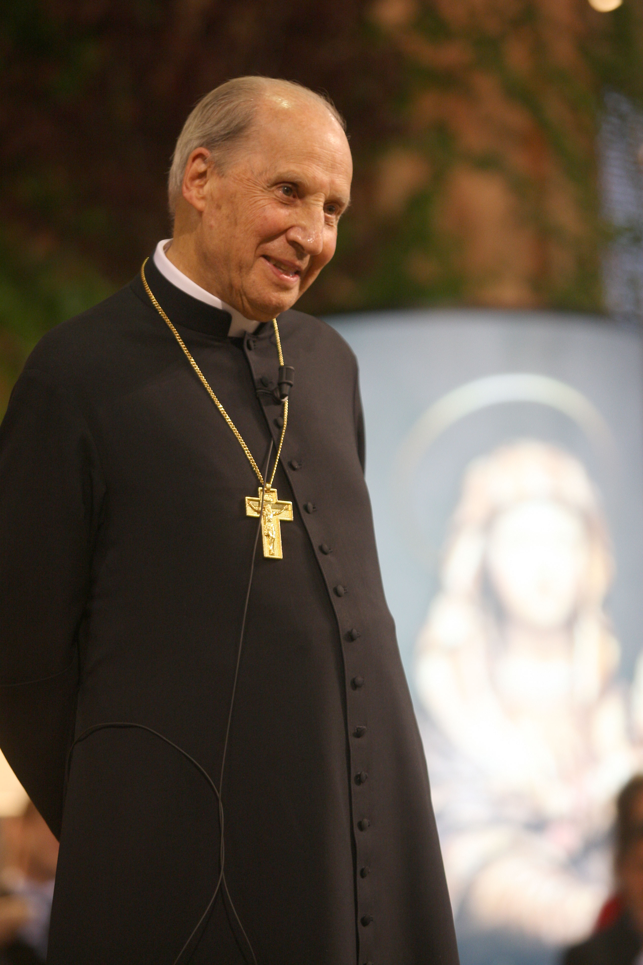 Javier Echevarría, Obispo Prelado del Opus Dei